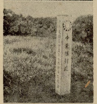 中國新海軍插圖